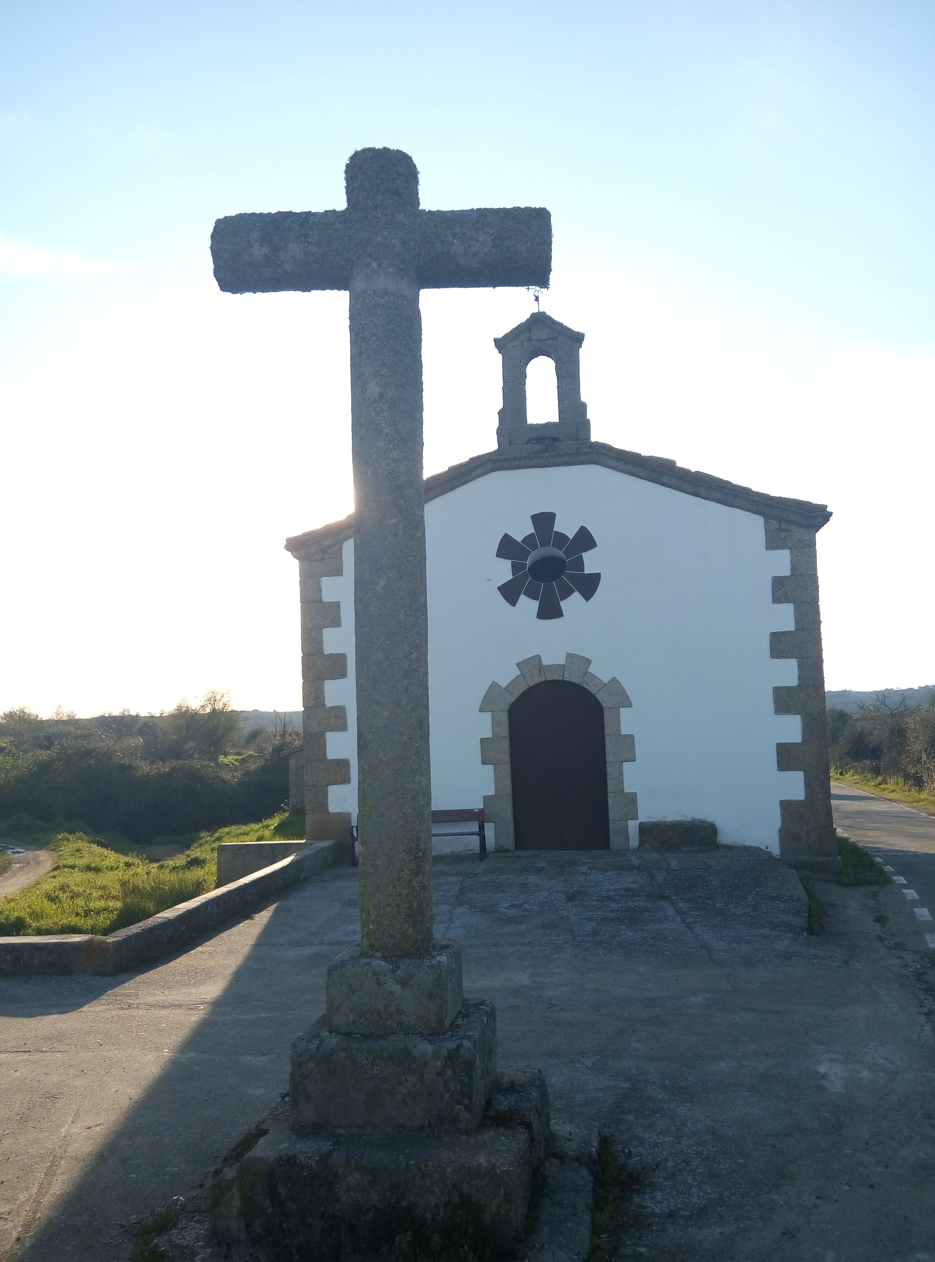 Ermita del Cristo en La Alameda de Gardón.